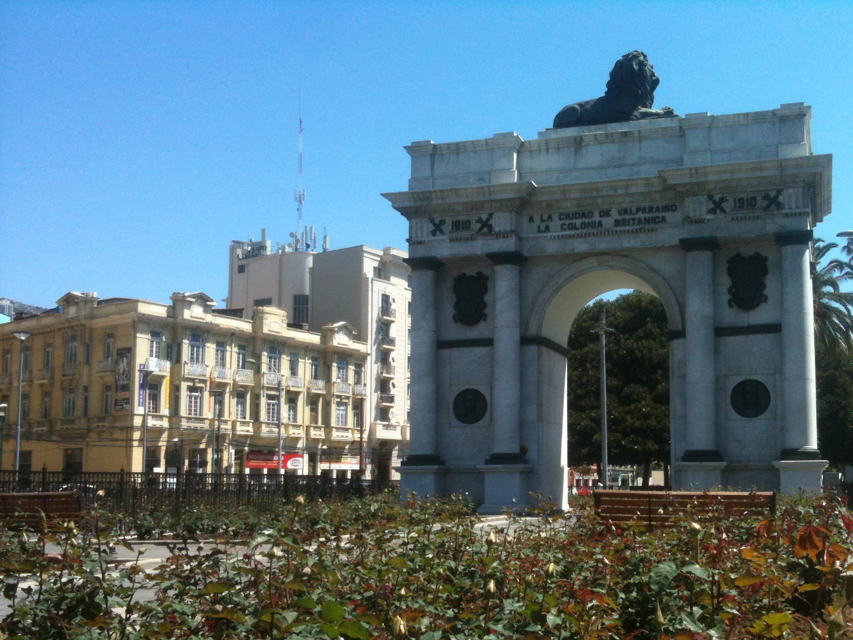 Monumento donado por la colonia británica a la ciudad de Valparaíso, Chile.